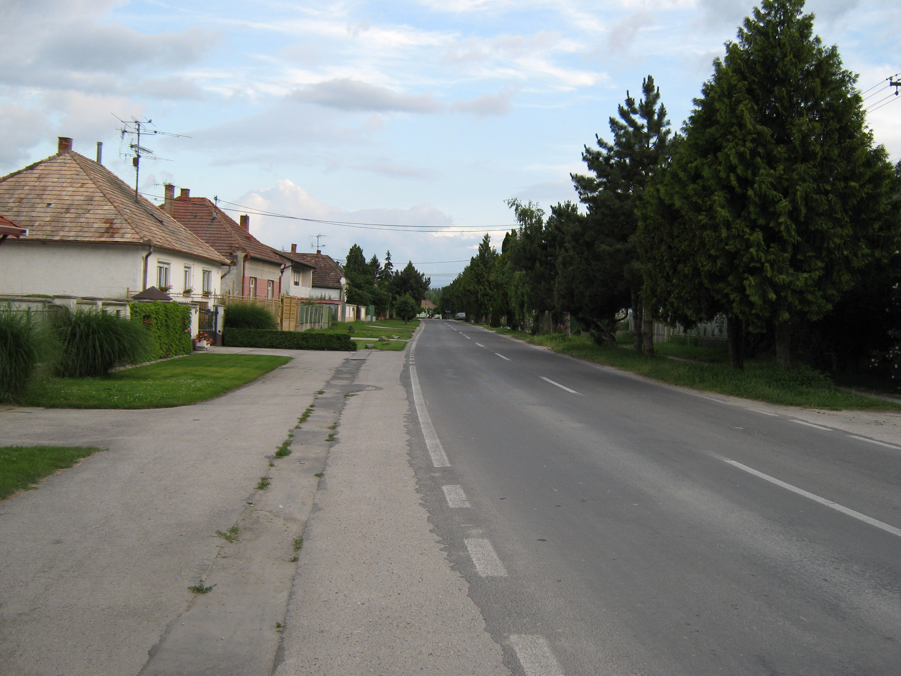 Medvei utcarészlet (2)